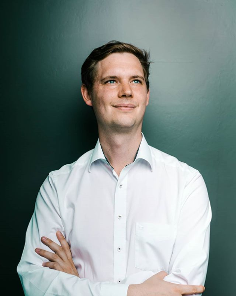 Foto von Jonas Glüsenkamp